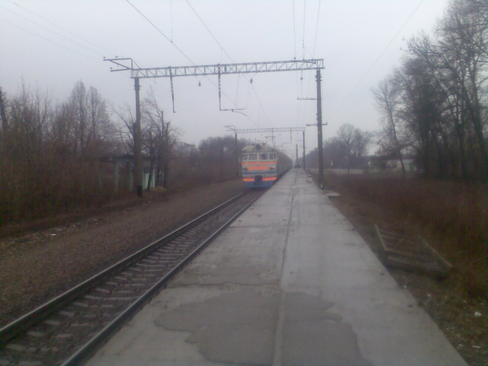 Залізнична платформа Феськи (Феськи, Харківська область): Залізнична платформа Феськи (Феськи, Харківська область)